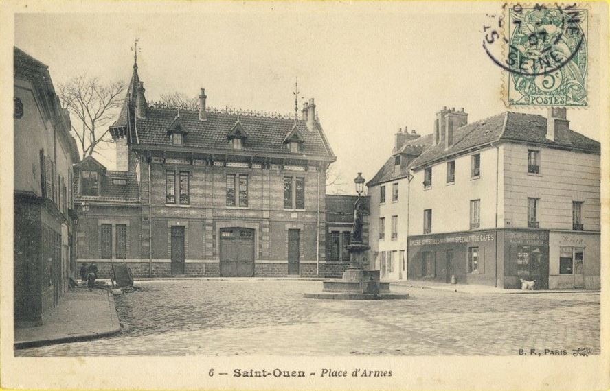 Saint-Ouen.Place d'Armes